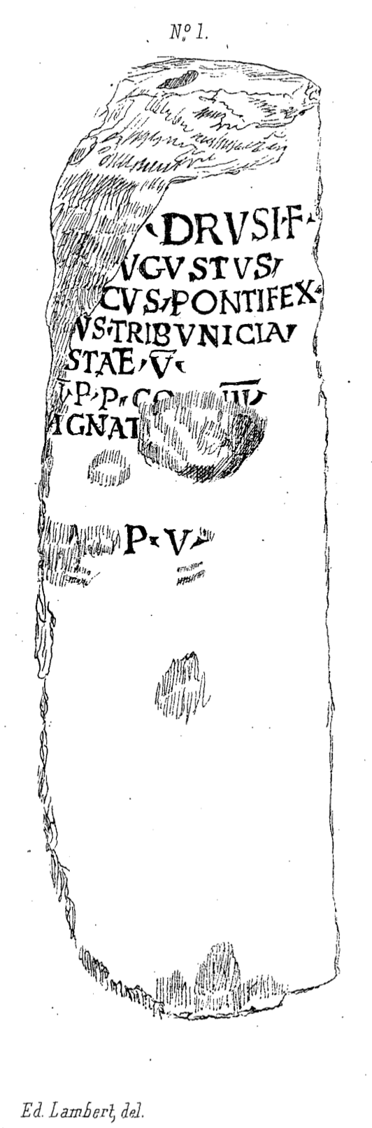 Borne milliaire du Manoir, dessin d'Édouard Lambert. CIL XVII2, 00449 = CIL XIII, 08976